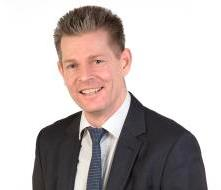 Buergermeister2012-2024